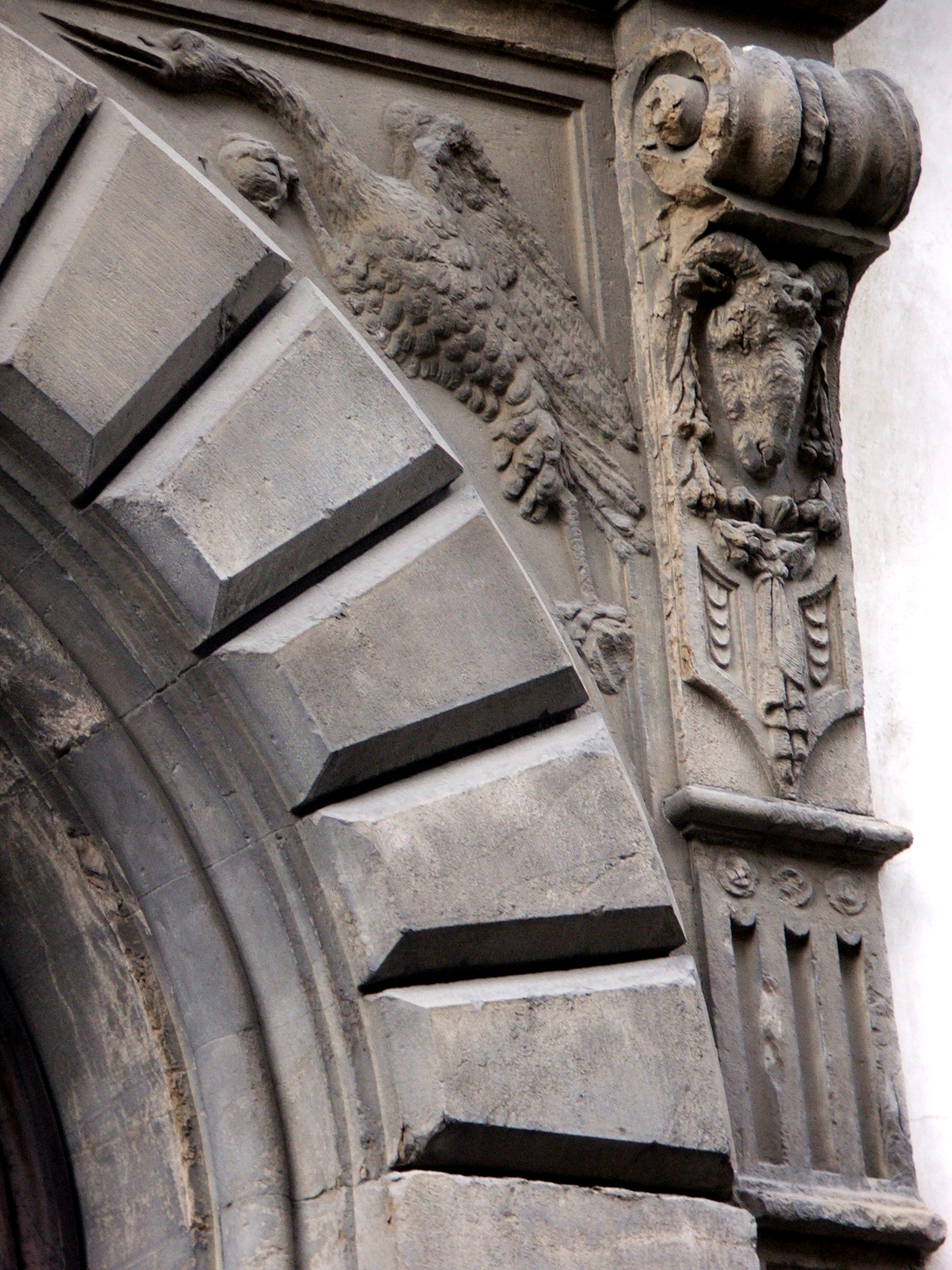 Palazzo Giugni, particolare della decorazione del portale